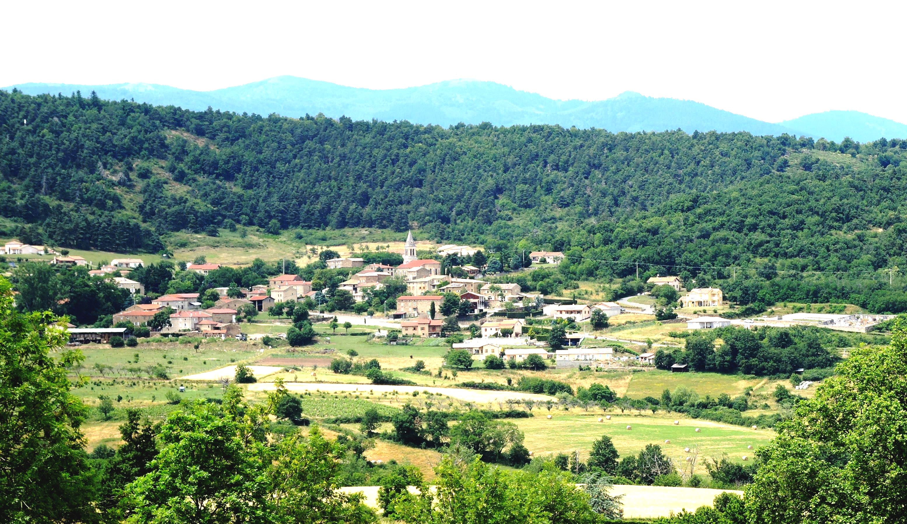 Vinzieux détail